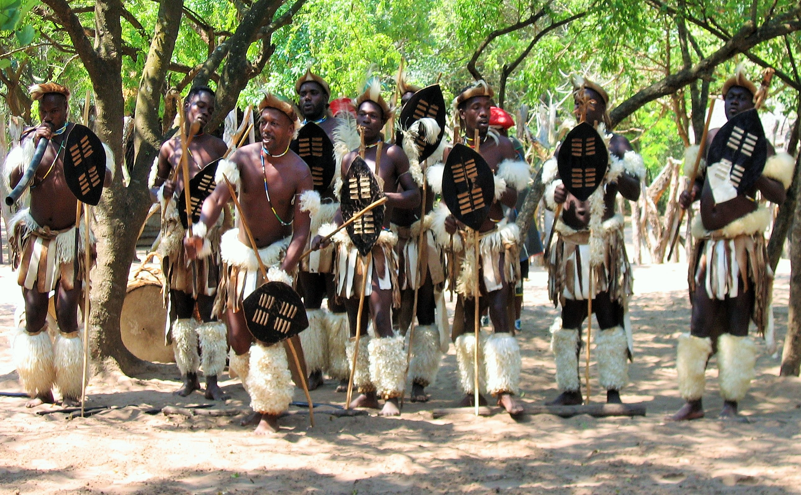 Mantenga Swazi Cultural Village Swaziland